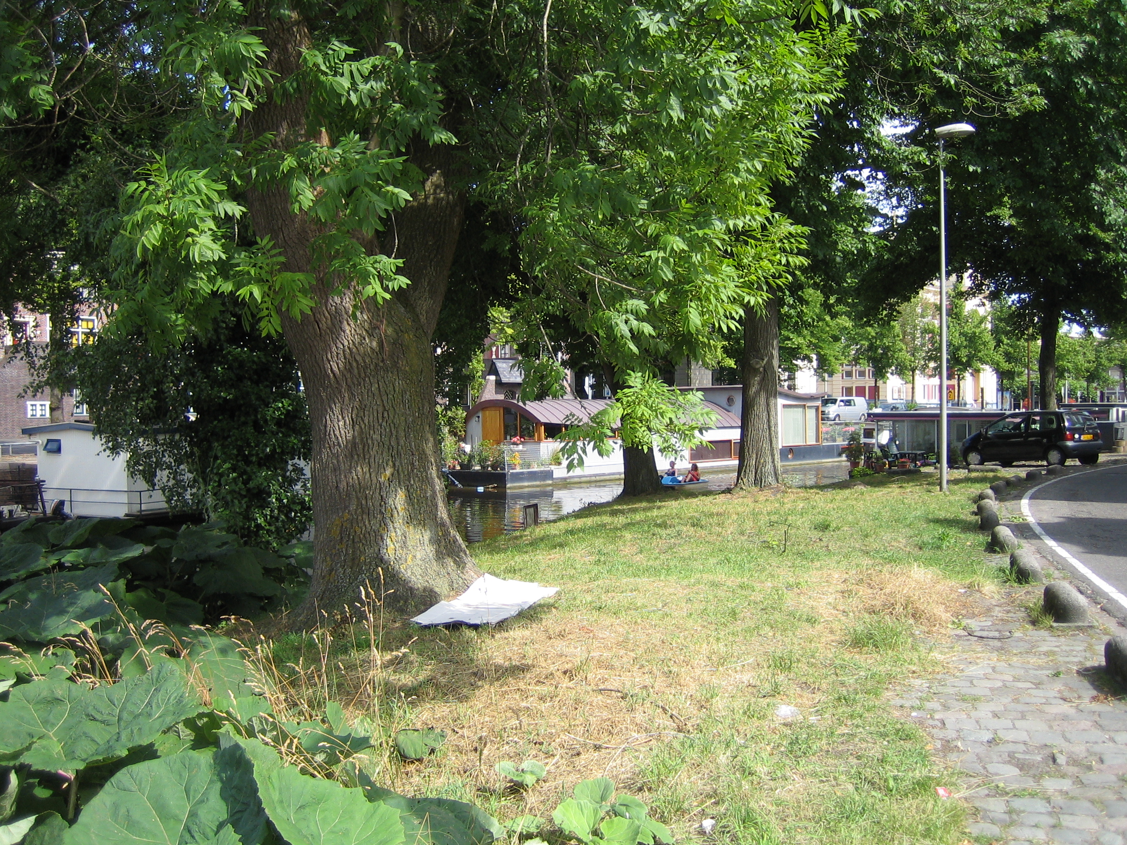 Turfsingel Groningen, genomen op het punt waar de overslag van turf plaatsvond. Het turf dat tussen wal en schip viel vormde in de loop der tijd deze uitstulping van de wal.